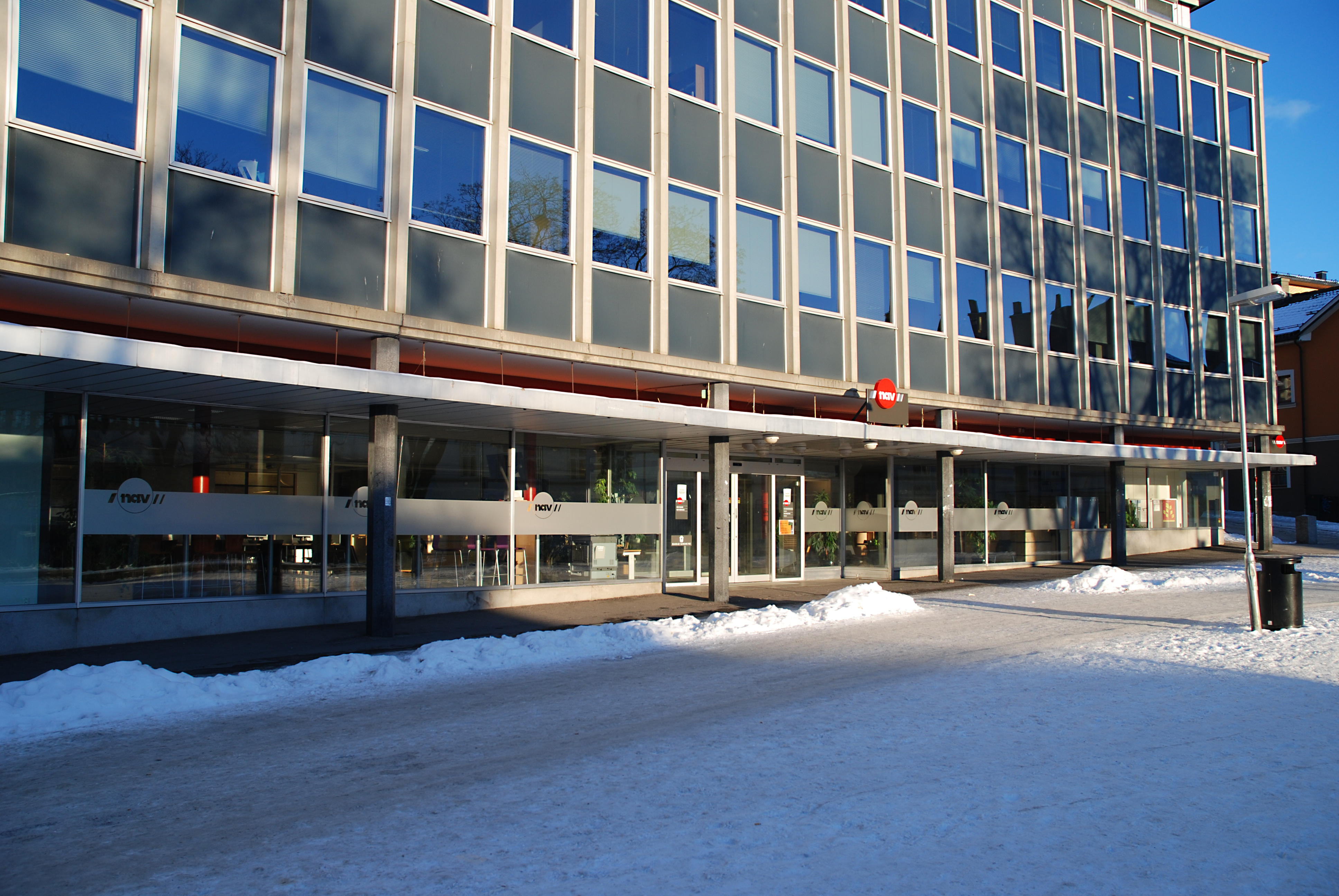 Triangelgården, in Hamar, Norway.